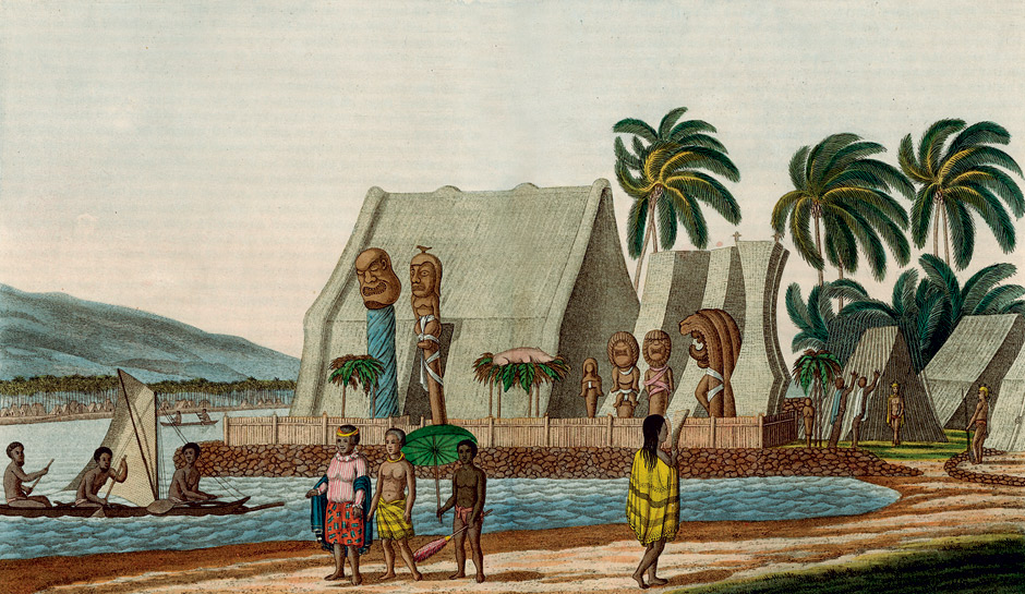 Ansicht von dem Königlichen Murai in der Bucht Ti-utatua der Insel O Waihi, neben welchem die Königin Kahumana mit ihrer Tochter spatzieren geht (Kailua Bay on the big island of Hawaii) aus: Otto von Kotzebue: Entdeckungs-Reise in die Süd-See und nach der Berings-Straße zur Erforschung einer nordöstlichen Durchfahrt. Unternommen in den Jahren 1815, 1816, 1817 und 1818, auf Kosten ... des Grafen Rumanzoff auf dem Schiffe Rurick. Weimar, Hoffmann, 1821.